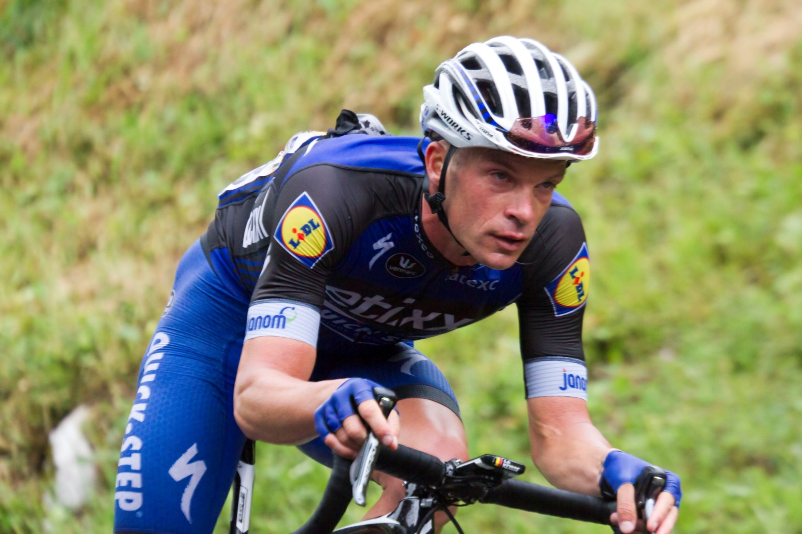 9276 keisse